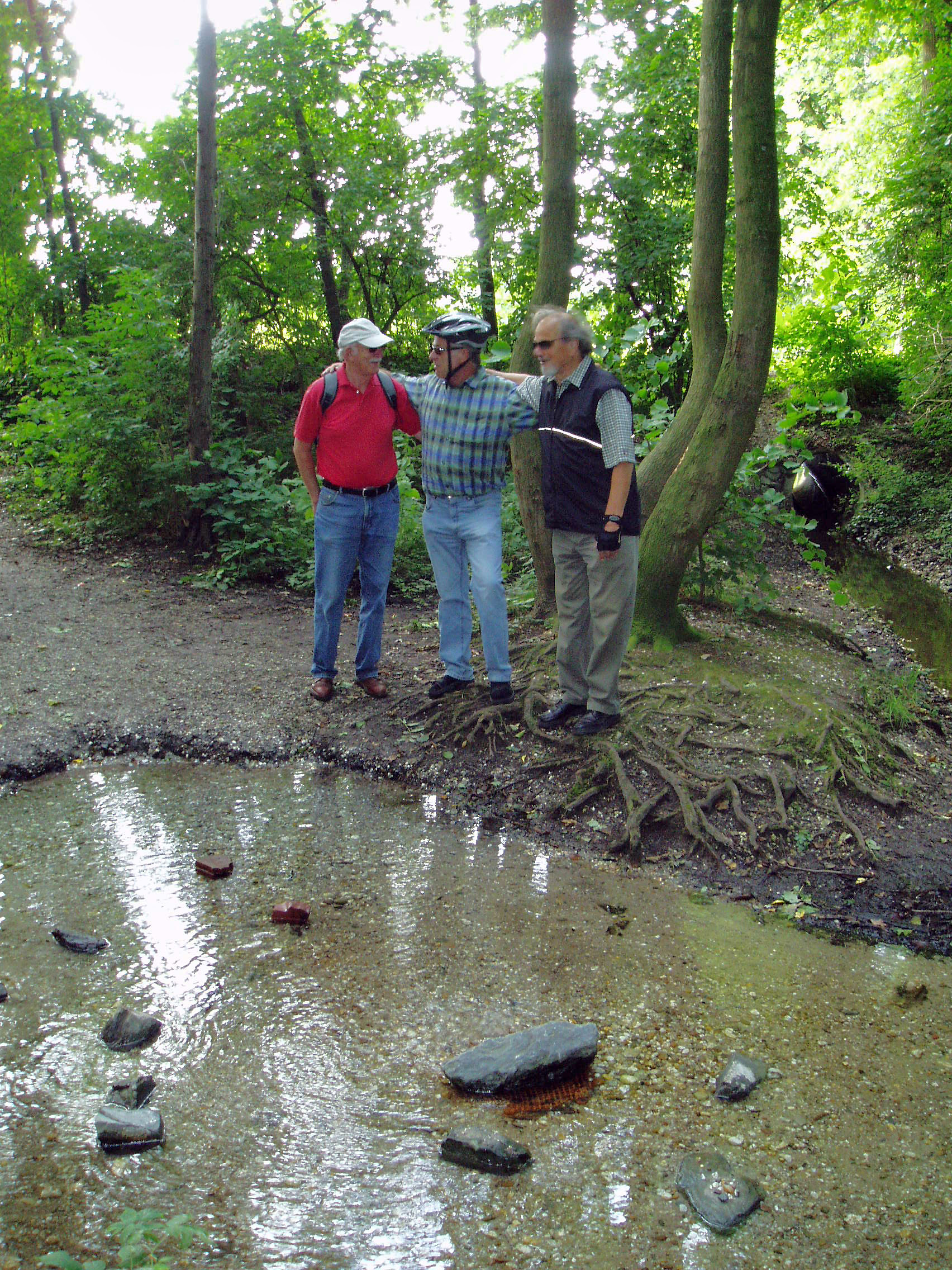 Die Schwalm - Quelle